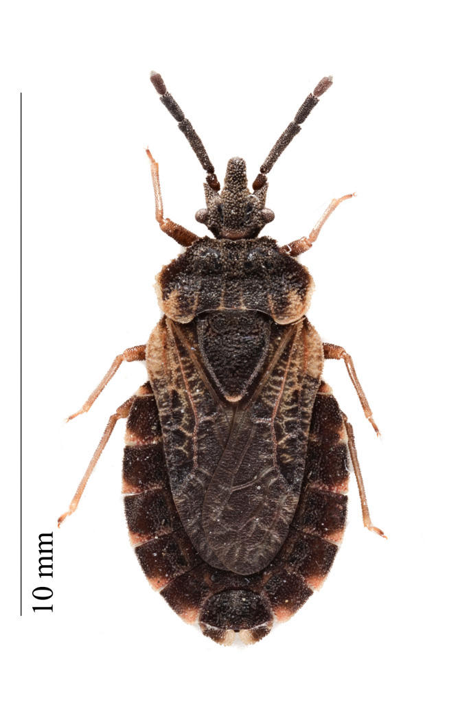 Aradus corticalis